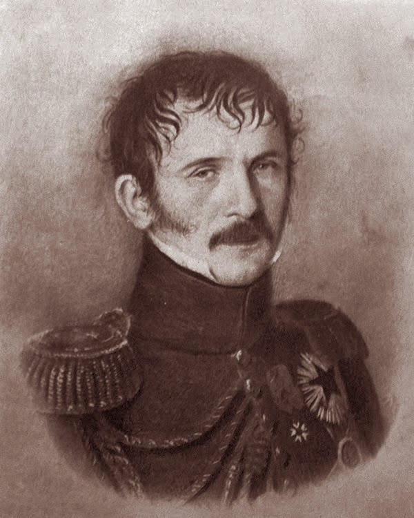 Christophe Antoine Merlin, général de division (1771-1839).